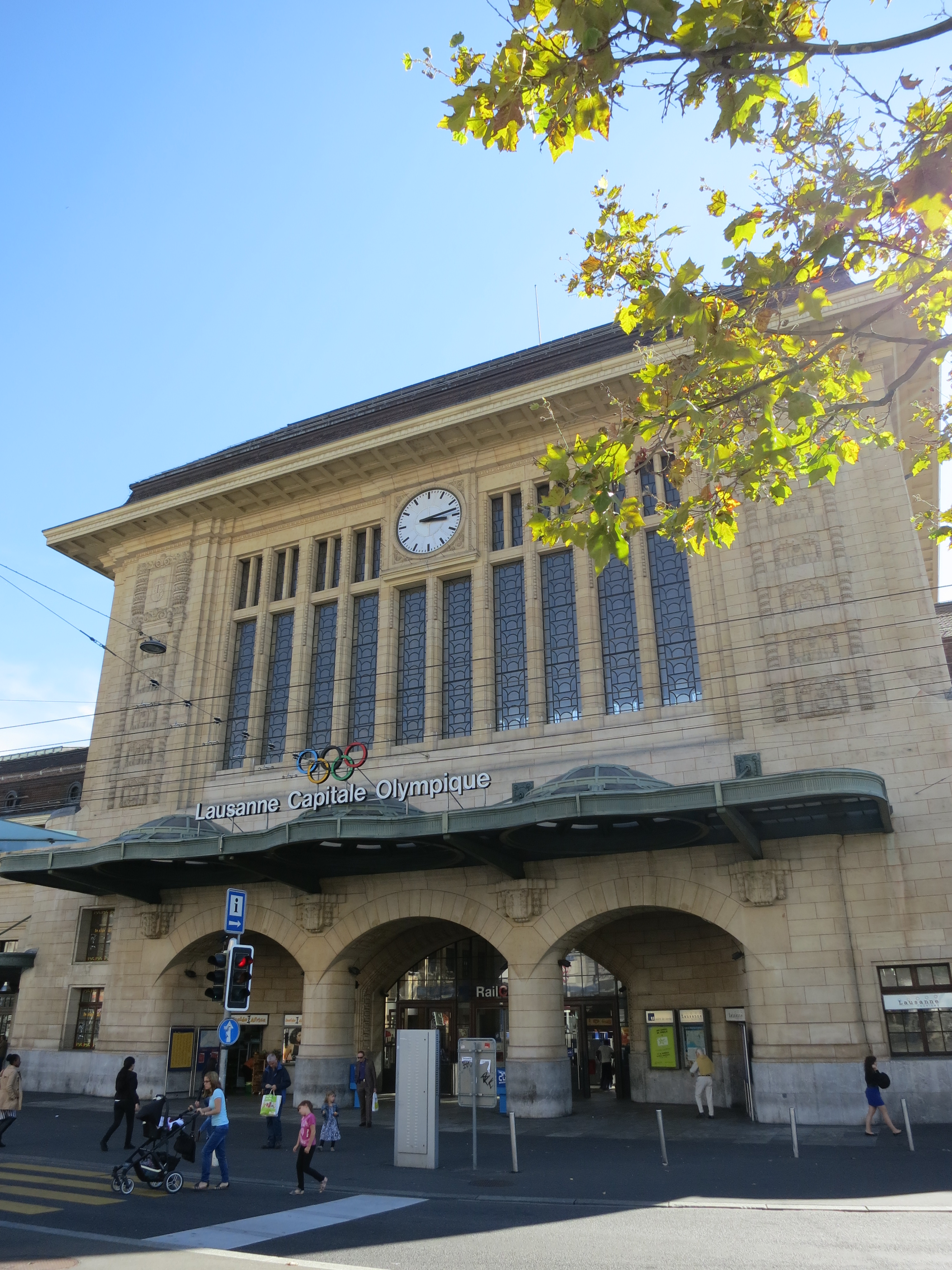 Bahnhof Lausanne